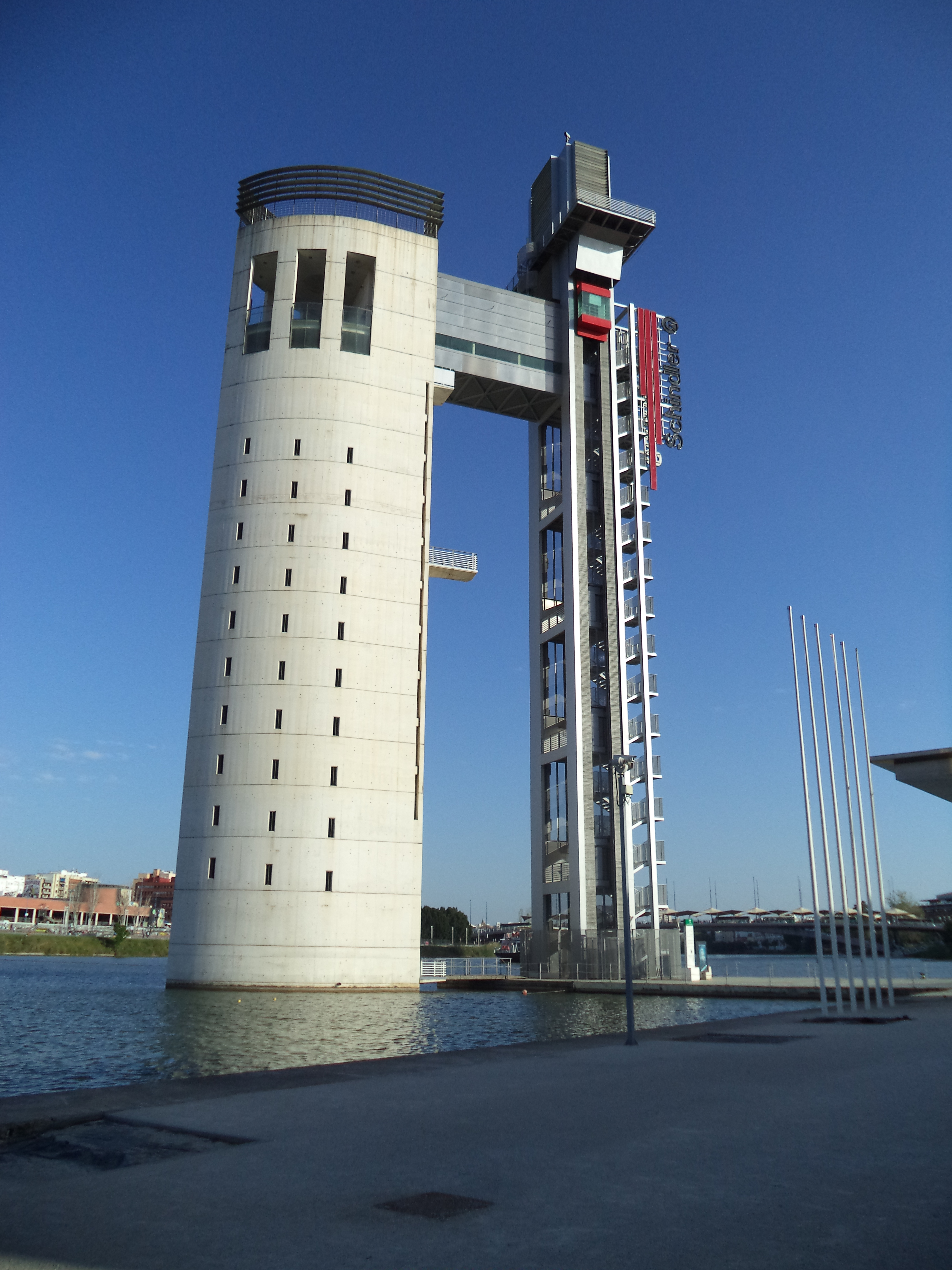 Torre Schindler en el Pabellón de la Navegación de Sevilla, en España